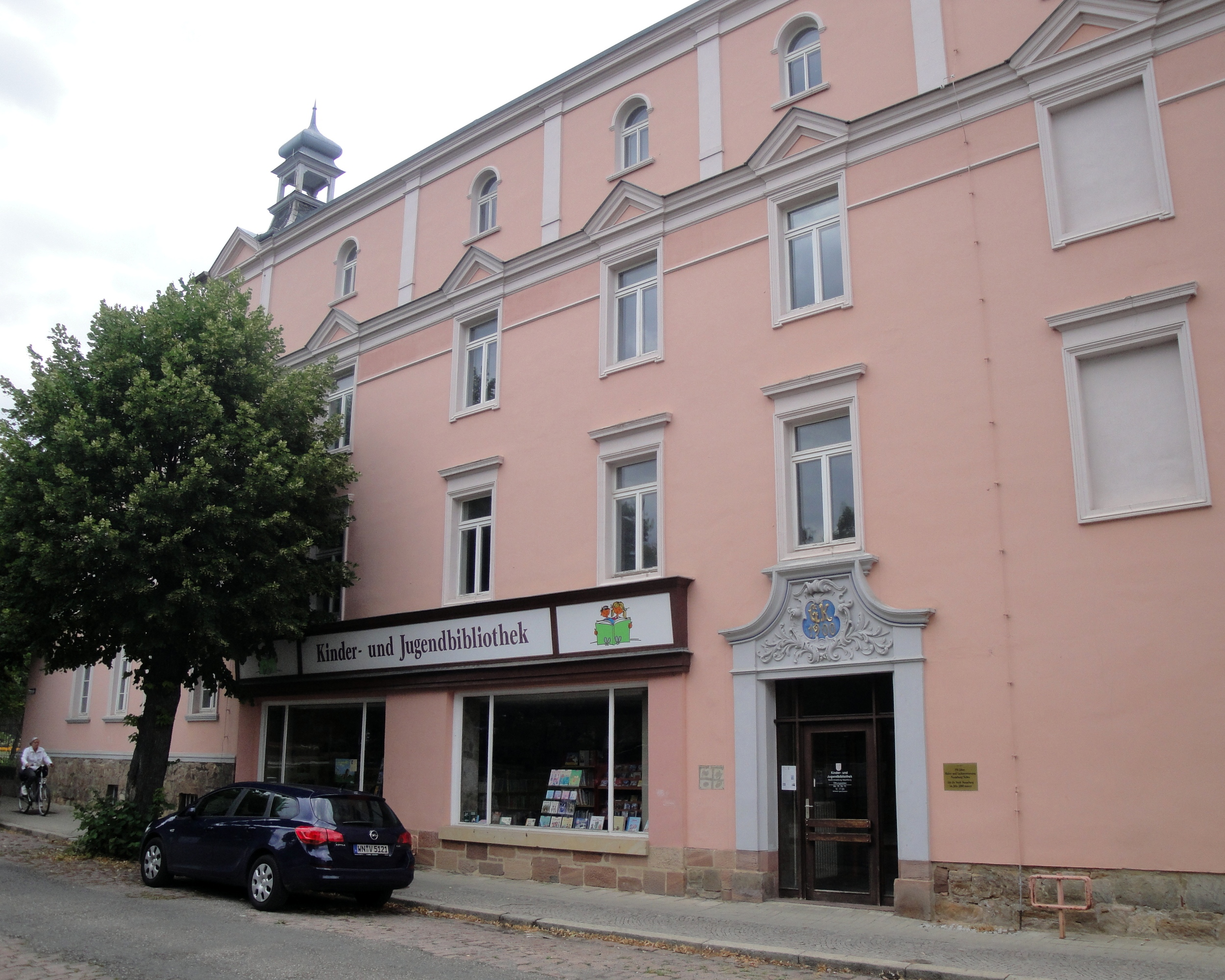 Kinder- und Jugendbibliothek, Naumburg (Saale)